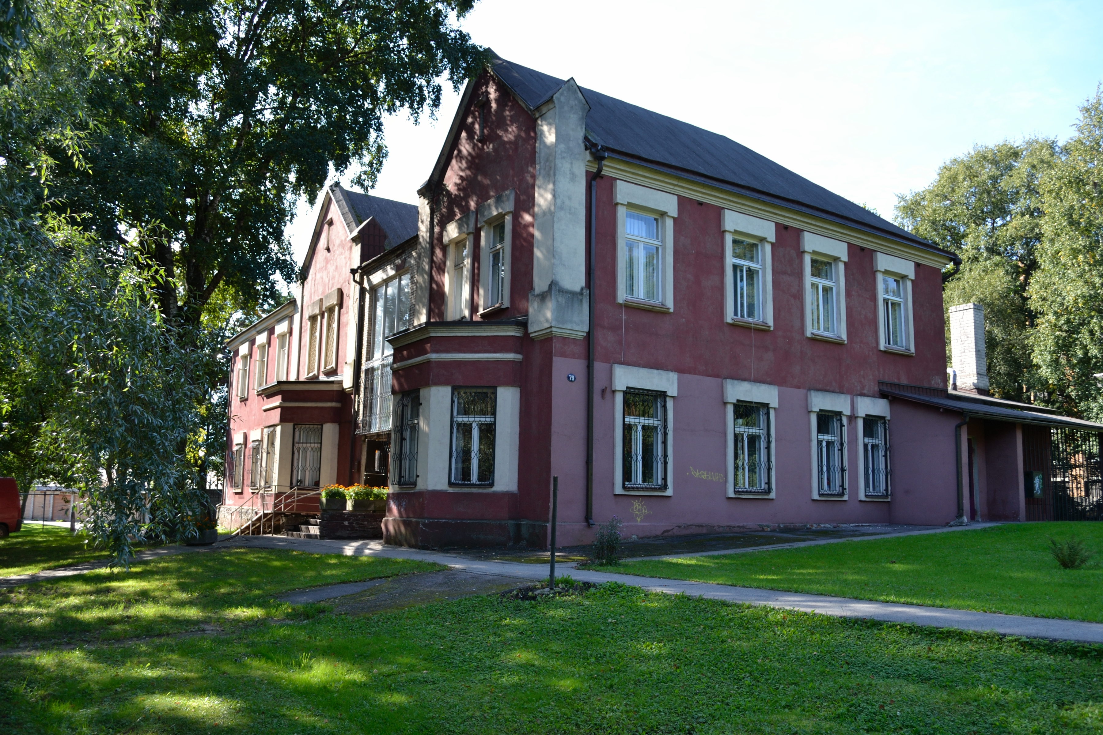 Tallinn, Bekkeri laevatehase direktori elamu, 1912-1914